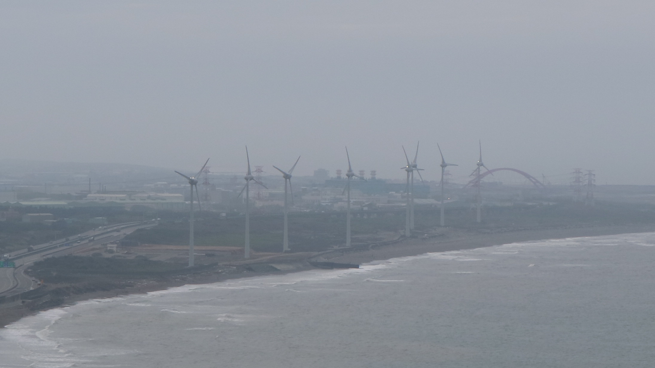 從林口發電廠一號機鍋爐房頂遙望蘆竹風力發電站